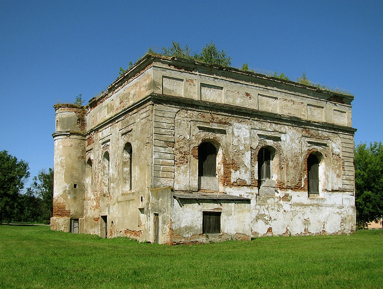 Беларуская (тарашкевіца): Будынак былой сінагогі, ляпны дэкор паўсферычнага перакрыцця ніжняга яруса. г. Быхаў This is a photo of Belarusian heritage monument. Reference number: 512Г000156 ( WLM)